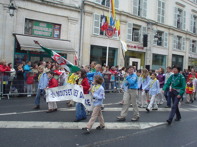 Groupe de Scouts et Guides de France dans la rue Jeanne-d'Arc (au niveau des numéros 20 et 16) à Orléans, le 8 mai 2006 lors des fêtes de Jeanne d'Arc.